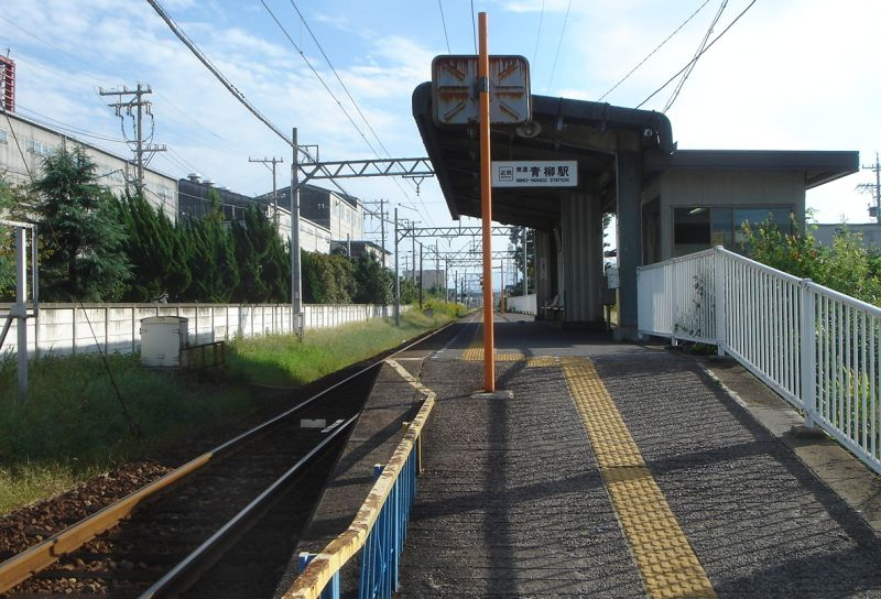 美濃青柳駅（岐阜県大垣市、近鉄養老線（当時、現：養老鉄道養老線）） 左(東)側はイビデンの工場 撮影：投稿者(Monami),撮影日：2005年10月